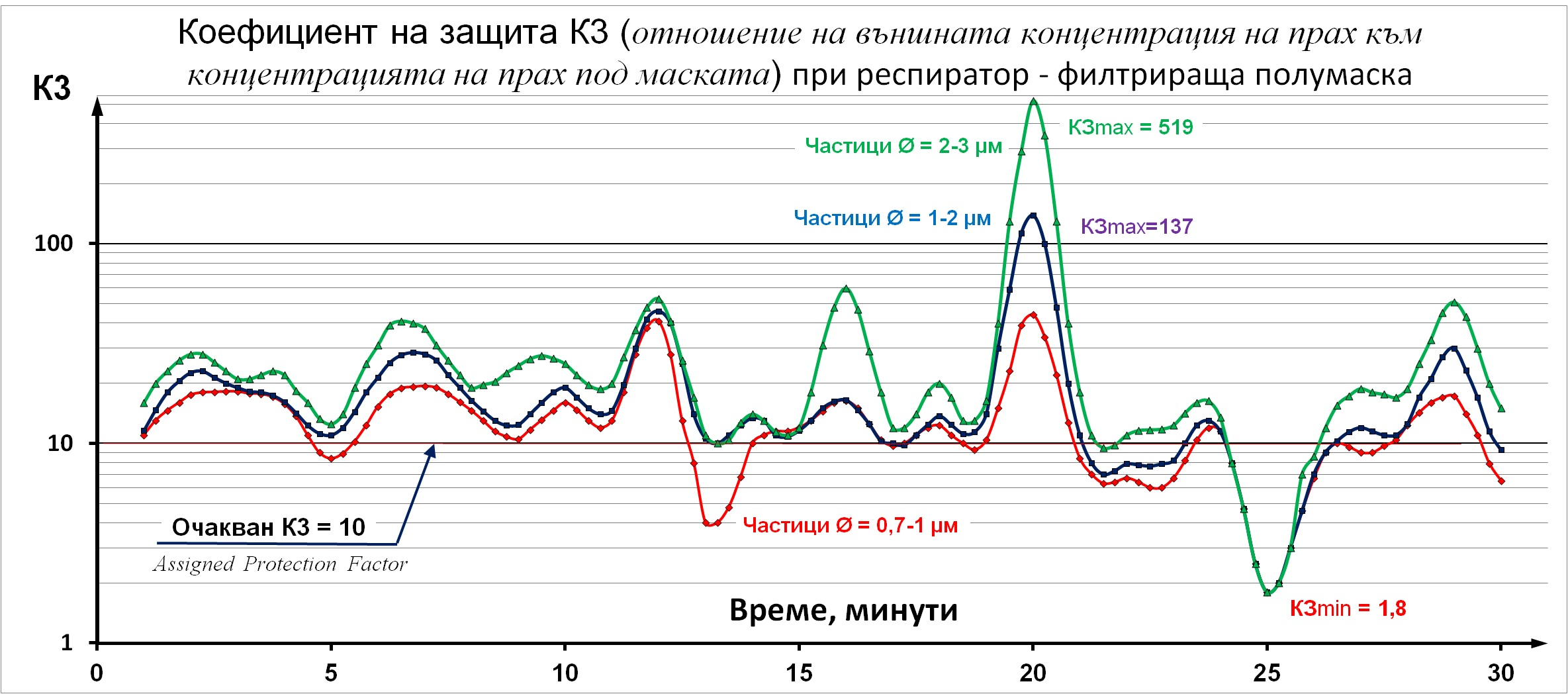 Иллюстрация непостоянства коэффициентов защиты СИЗОД, возникающего из-за динамического образования и изменения зазоров между маской и лицом во время работы.